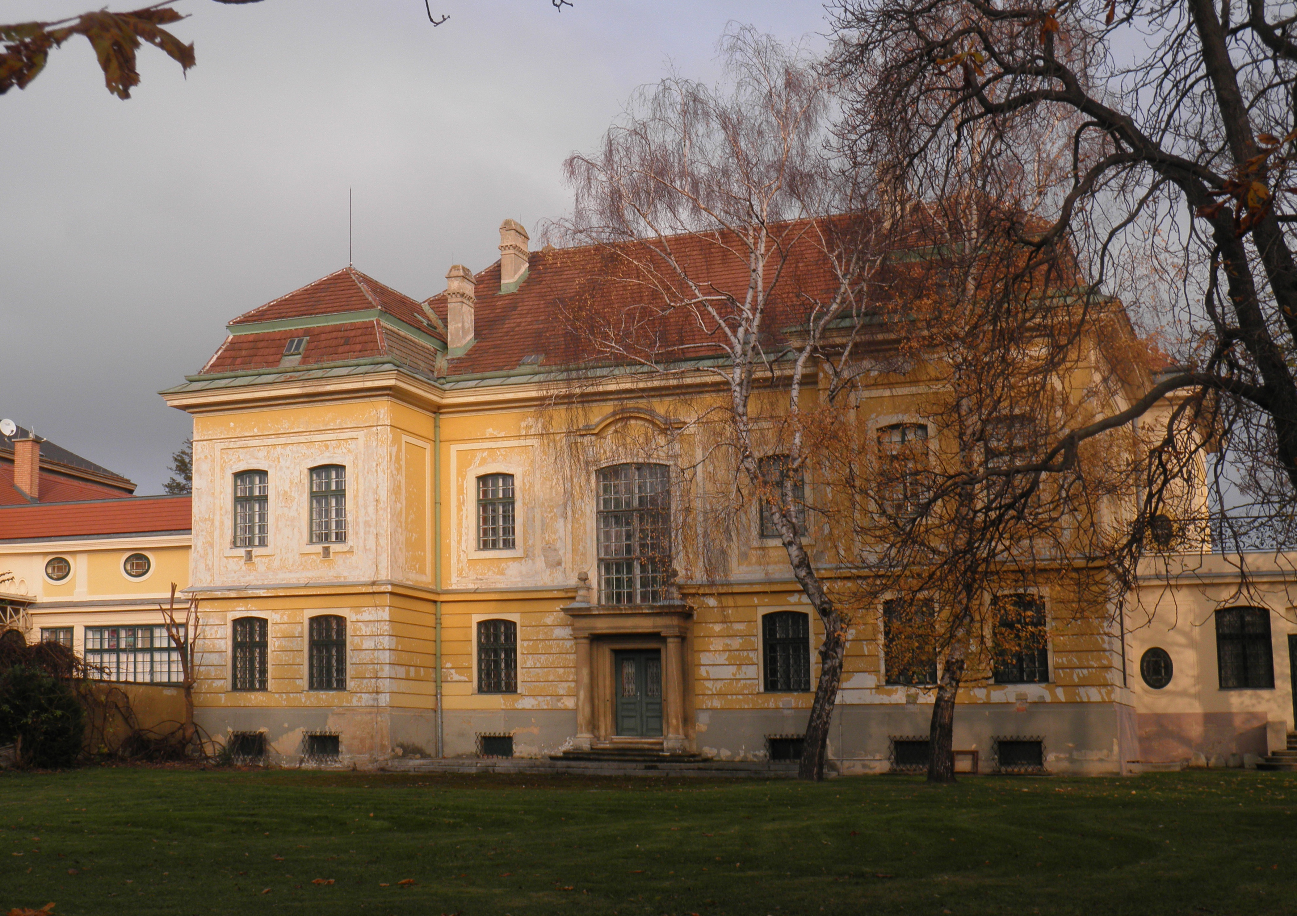 Bezirksmuseum Floridsdorf, ehem. Mautner-Markhof-Schlössl